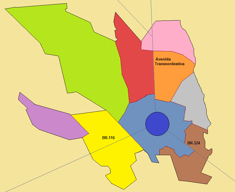 Mapa dos nove distritos de Feira de Santana. A Região Central está em azul claro, enquanto a Região Central dentro da avenida do Contorno está em azul escuro. Matinha está em cor laranja, Tiquaraçu está de rosa, Jaguara está de verde, Governador João Durval Carneiro está em amarelo, Bonfim de Feira está em lilás, Humildes está em marrom, Jaíba está em cinza e Maria Quitéria está em vermelho.